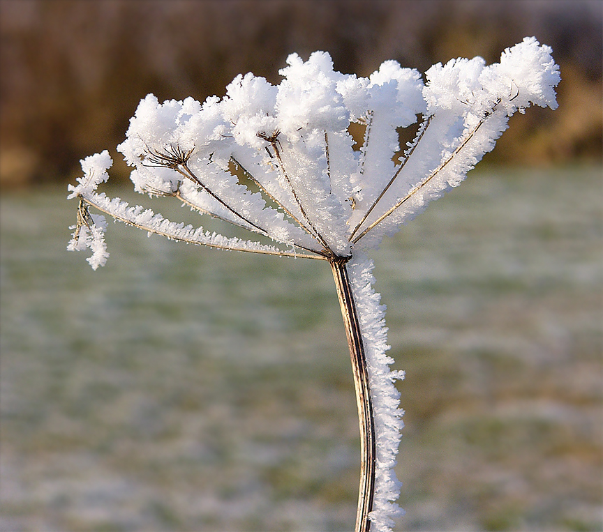 hoarfrost